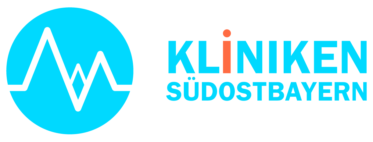 Logo Kliniken Südostbayern AG